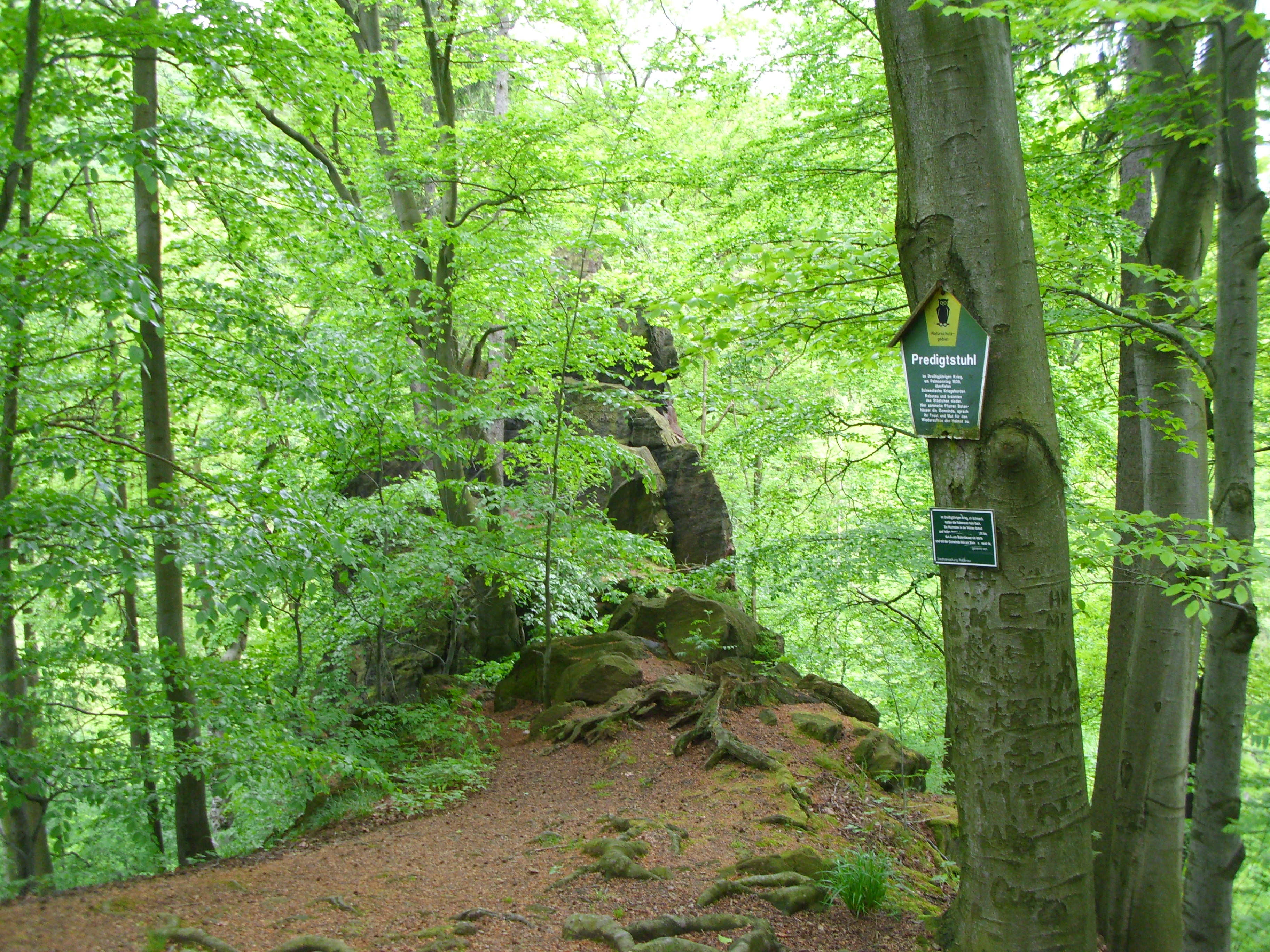 Hier befand sich wahrscheinlich auf der davor liegenden Gegend in früheren Zeit noch vor Rabenau eine Slawische Burg. im Predigtstuhl versteckten sich während des Krieges 1639 die Rabenauer Bürger